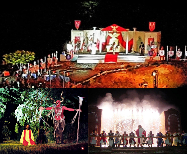 fotos do evento a paixão de cristo no município de cuitê no maior teatro ao ar livre da paraíba.